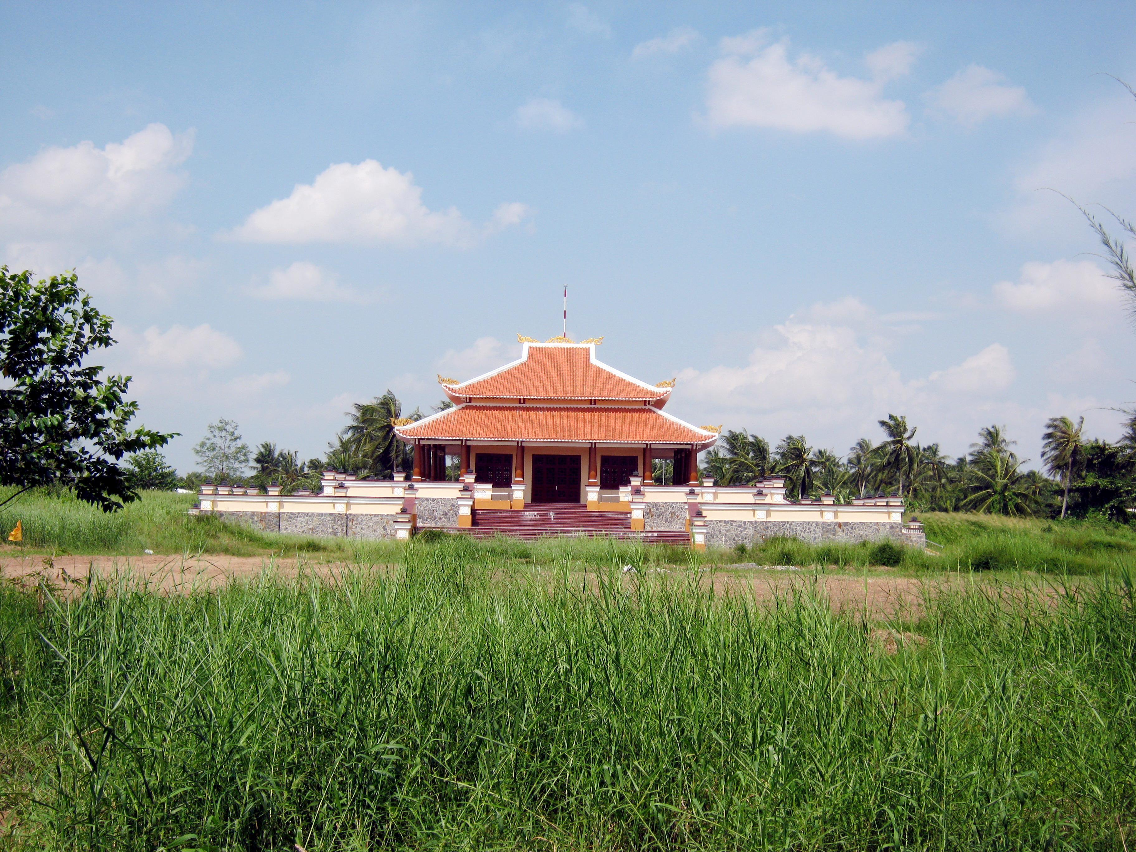 Đền thờ Bác Hồ tại ấp Đền Thờ, xã An Thạnh Đông, huyện Cù Lao Dung, tỉnh Sóc Trăng, Việt Nam. Ngôi đền được xây dựng năm 1970, vừa được trùng tu.